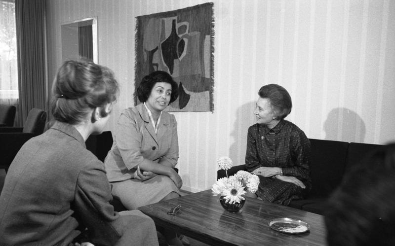 Sozialministerin v. Ägypten, Frau Dr. Abu Zeid bei Frau Gesundheitsministerin Schwarzhaupt in Bonn-Godesberg